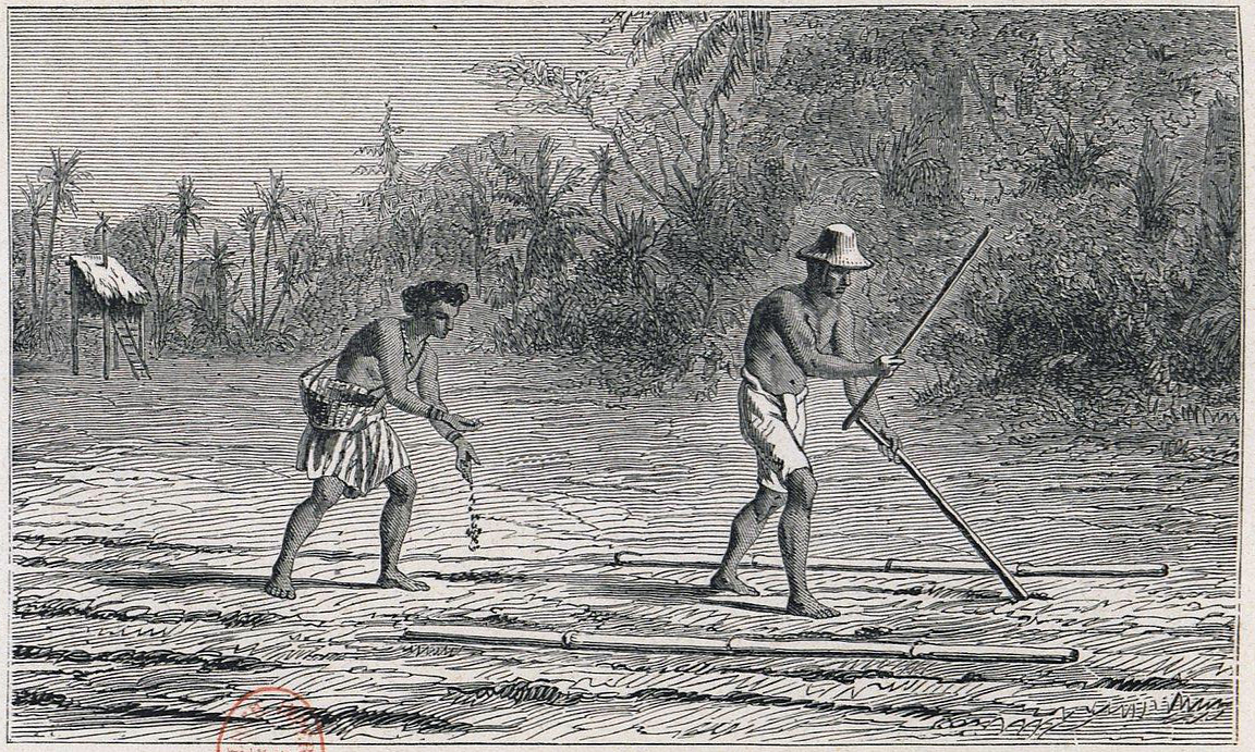 Planche 17 du livre Voyage dans les royaumes de Siam, de Cambodge, de Laos : "Labour et semailles chez les sauvages stiêngs."